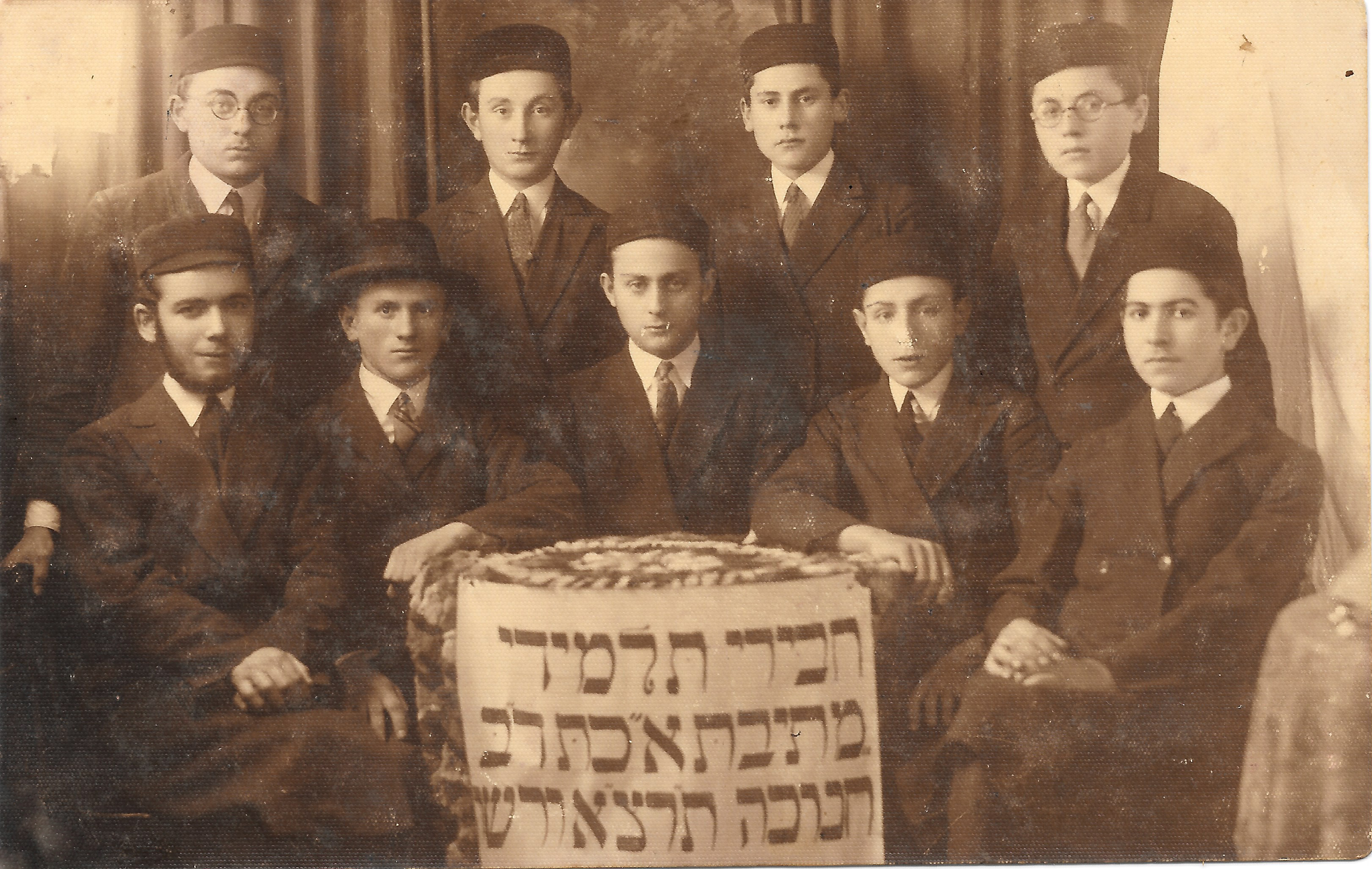 תלמידי מתיבתא שיעור ד' 2, חנוכה תרצ"א. ישיבת חסידות גור בראשות הרב מנחם זמבא, רח' שביינטוירסקי 18 ורשה, פולין. בישיבה מימין לשמאל: זלמן ינדזוביץ, דבזין. שמואל גולדנר, קרשניק. אהרן גרוסברד, מלבה. אריה וולף פינק - וורובלוק קרלובסקי, רומניה. אהרן צימרמן, בנדין. בעמידה מימין לשמאל: משה אהרן הורביץ, הרובישב. משה בגנו, קלצ'ב. ברוך גולדפינגר, דבצין. יעקב וולף אפטובסקי, זשיכלין.